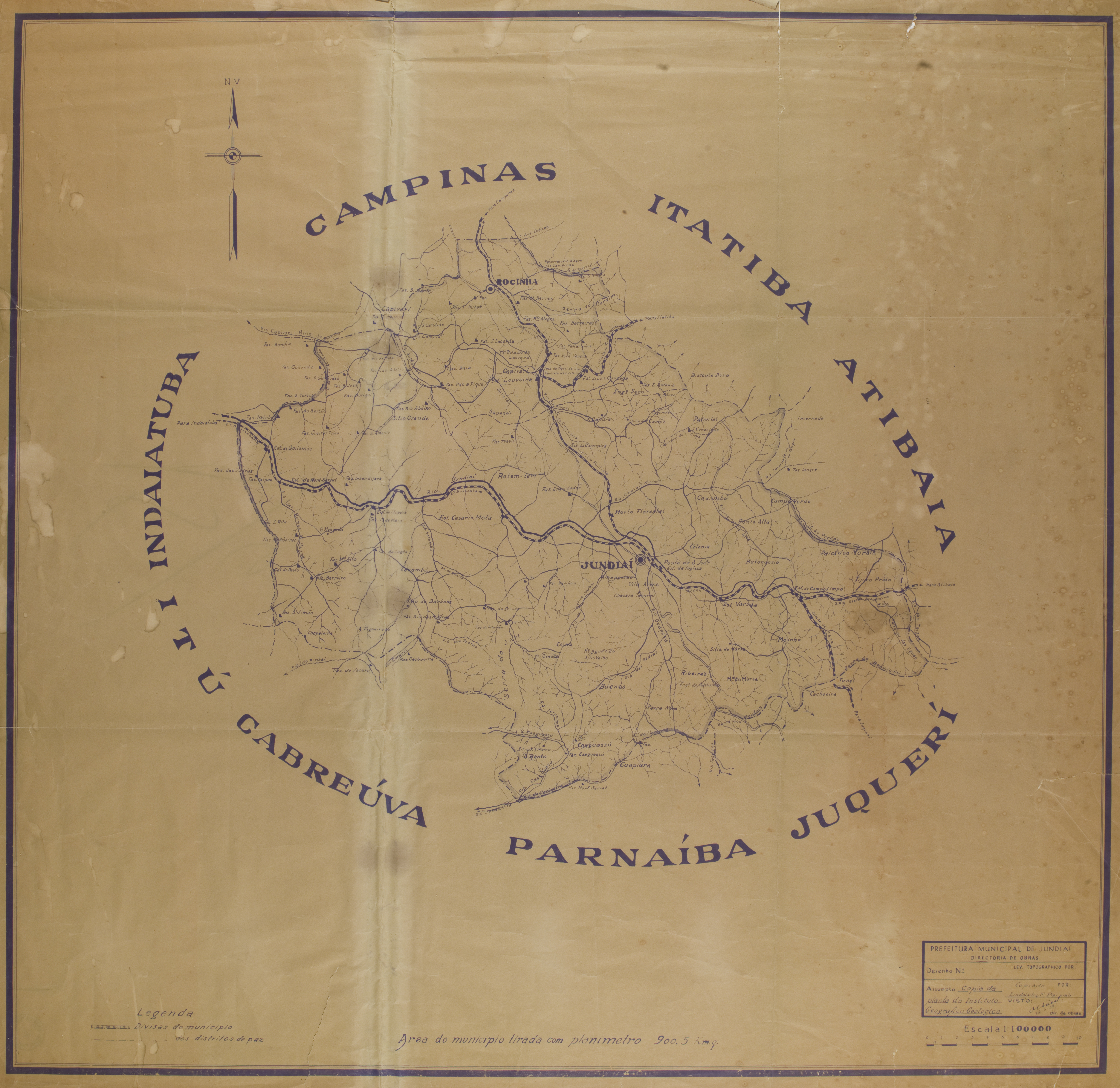 Obra que integra o acervo do Museu Paulista da USP. Coleção João Baptista de Campos Aguirra - Ref. Agente: Prefeitura Municipal de Jundiaí - Diretoria de Obras. Instituto Geográfico Geológico